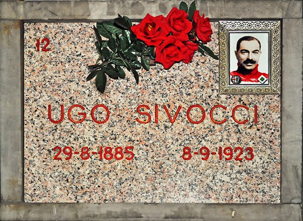 Cimitero Monumentale di Milano